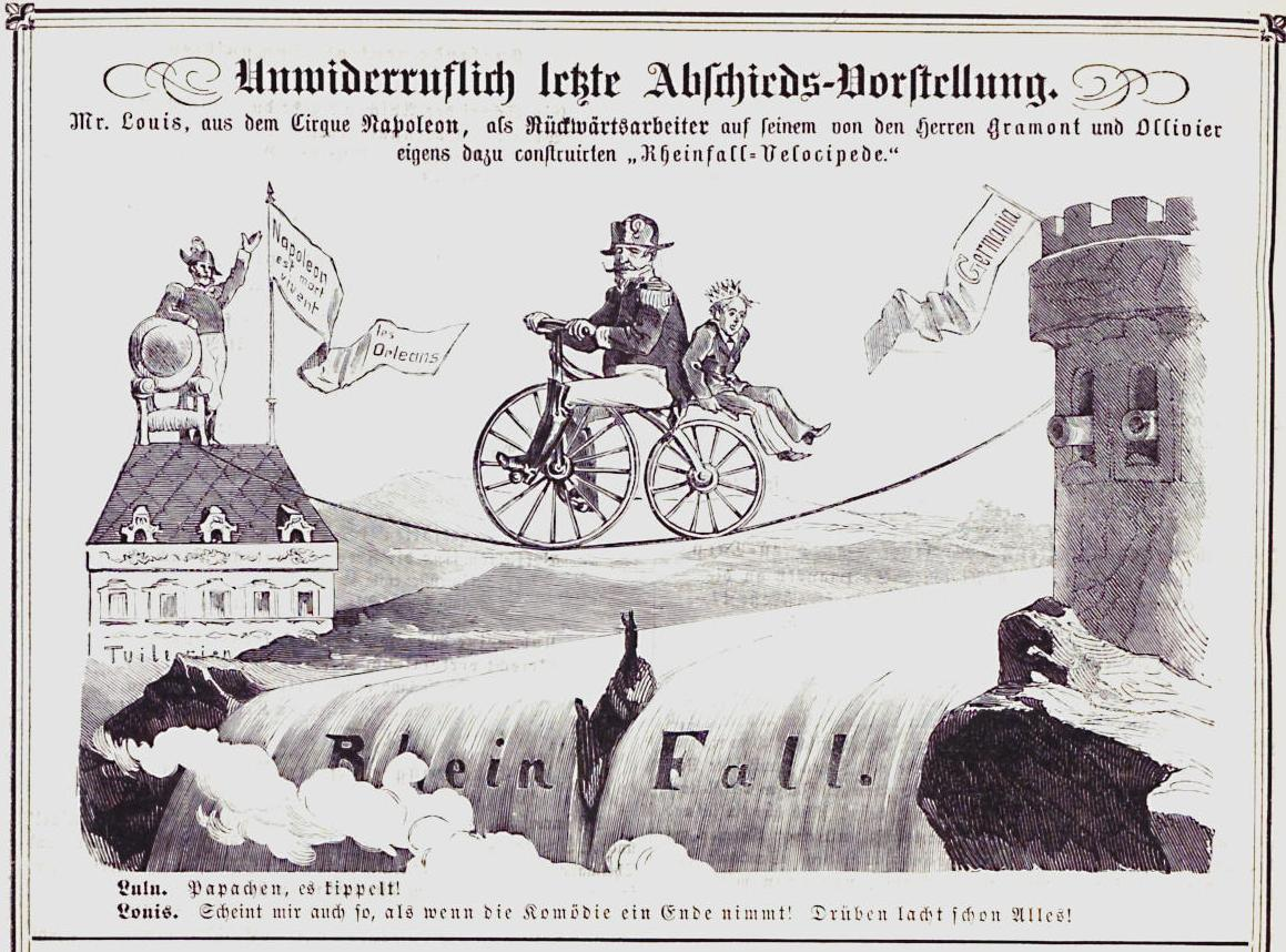 Napoleon III. und sein Sohn Lulu überqueren den Rheinfall. Gemeint ist natürlich ein Reinfall.